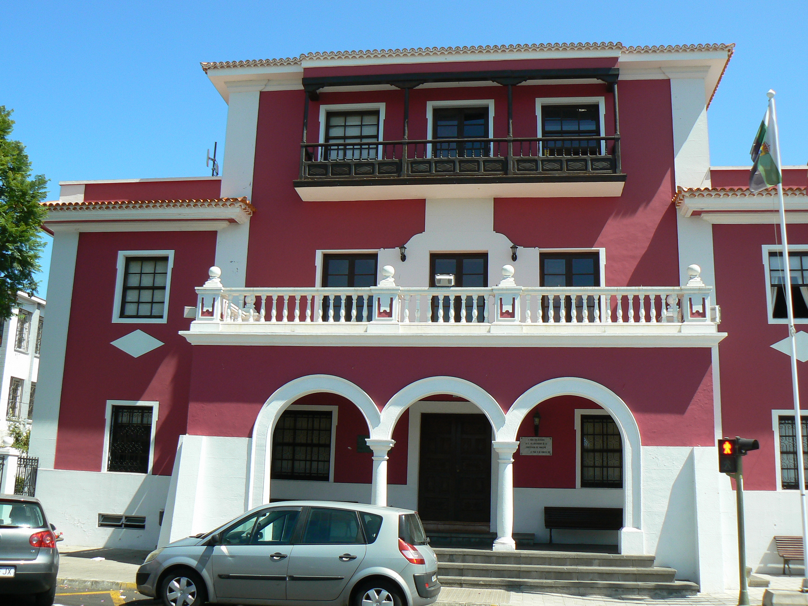 Municipio di El Paso (isola de La Palma, Canarie) nel 2011.